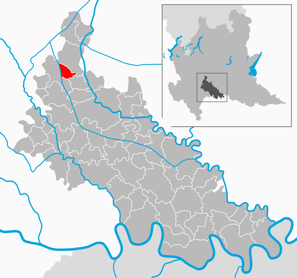 Il comune di Cervignano d’Adda nella provincia di Lodi